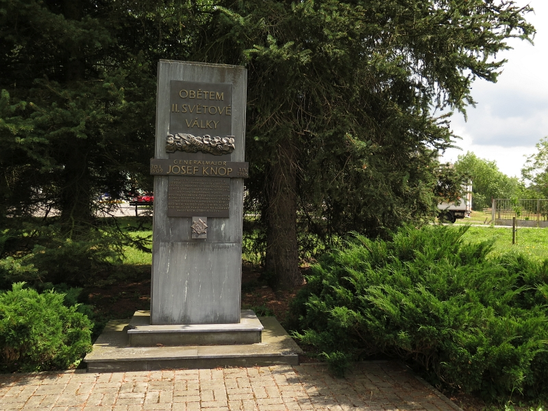 Pomník Karla Bubly, Bublovo náměstí nyní generála Knopa, Žamberk.